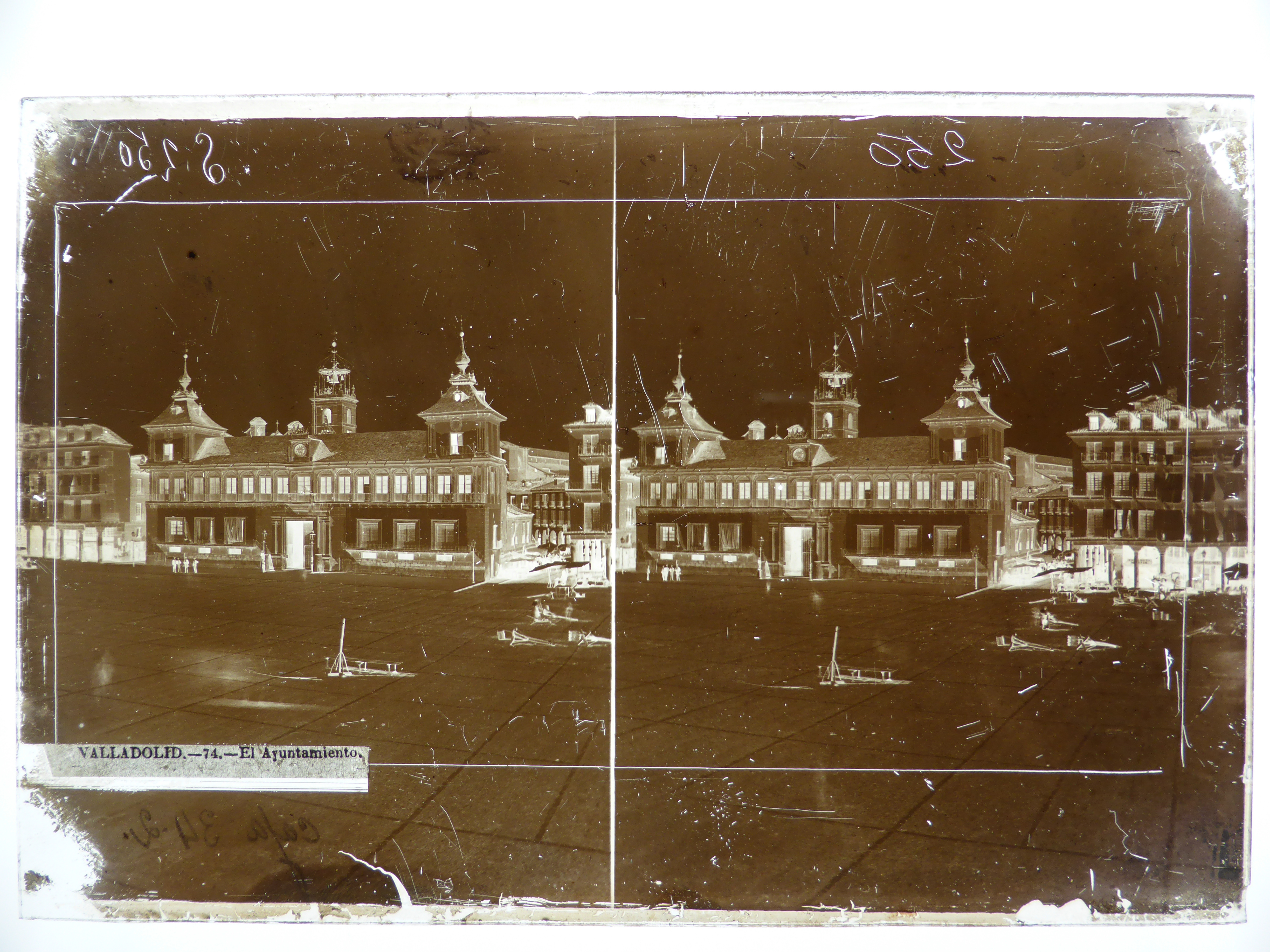 Negativo de vidrio al colodión húmedo, tomado por J. Laurent, en Valladolid. Es una fotografía estereoscópica. De ese negativo, en el siglo XIX, se positivaron copias en papel a la albúmina. Los pares estereoscópicos, en positivo, montados en una tarjeta, se podían ver en tres dimensiones, en relieve, con un visor apropiado. Negativo original conservado en la Fototeca del "Instituto del Patrimonio Cultural de España" (IPCE), en Madrid.